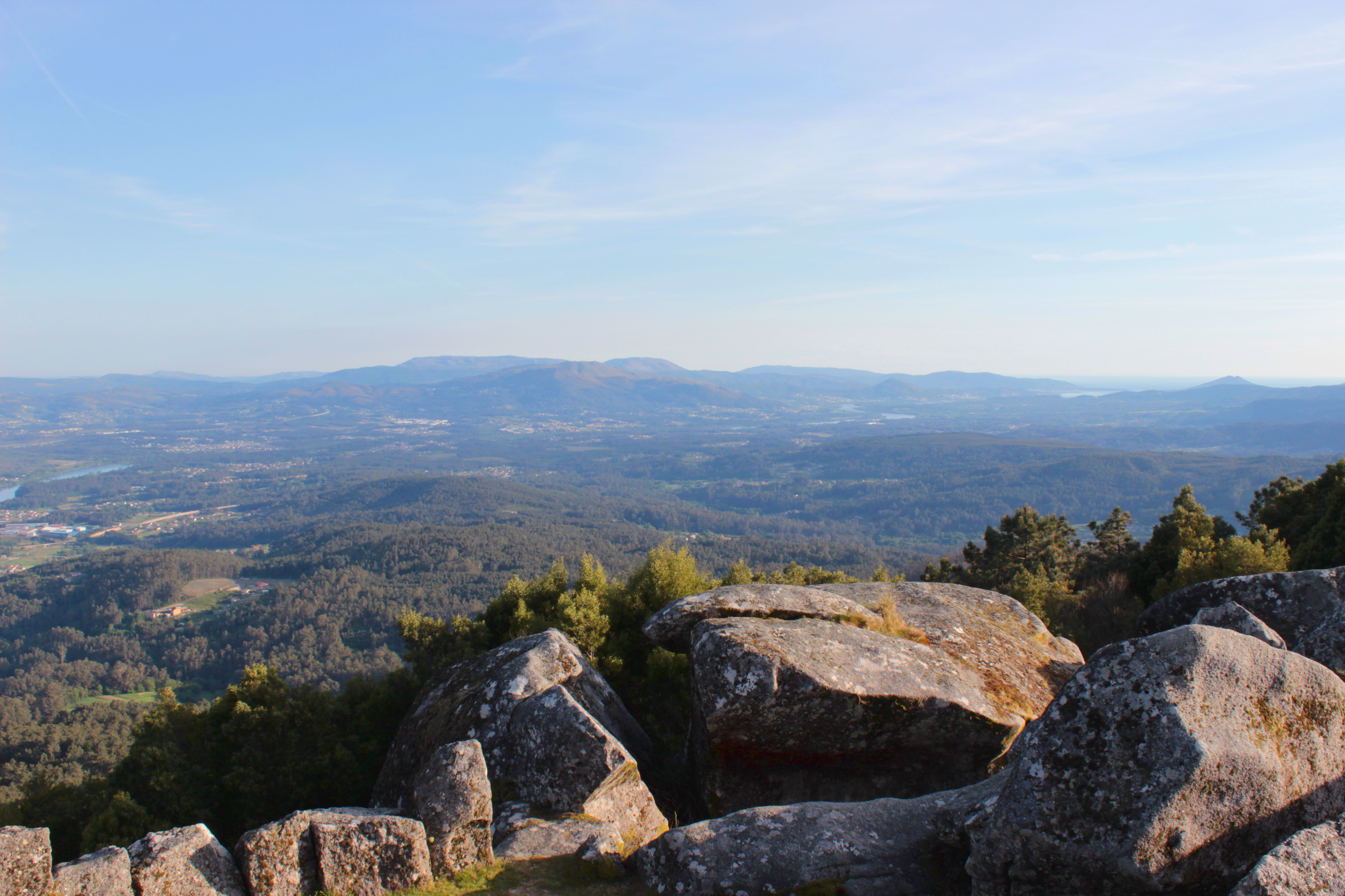 Monte Aloya